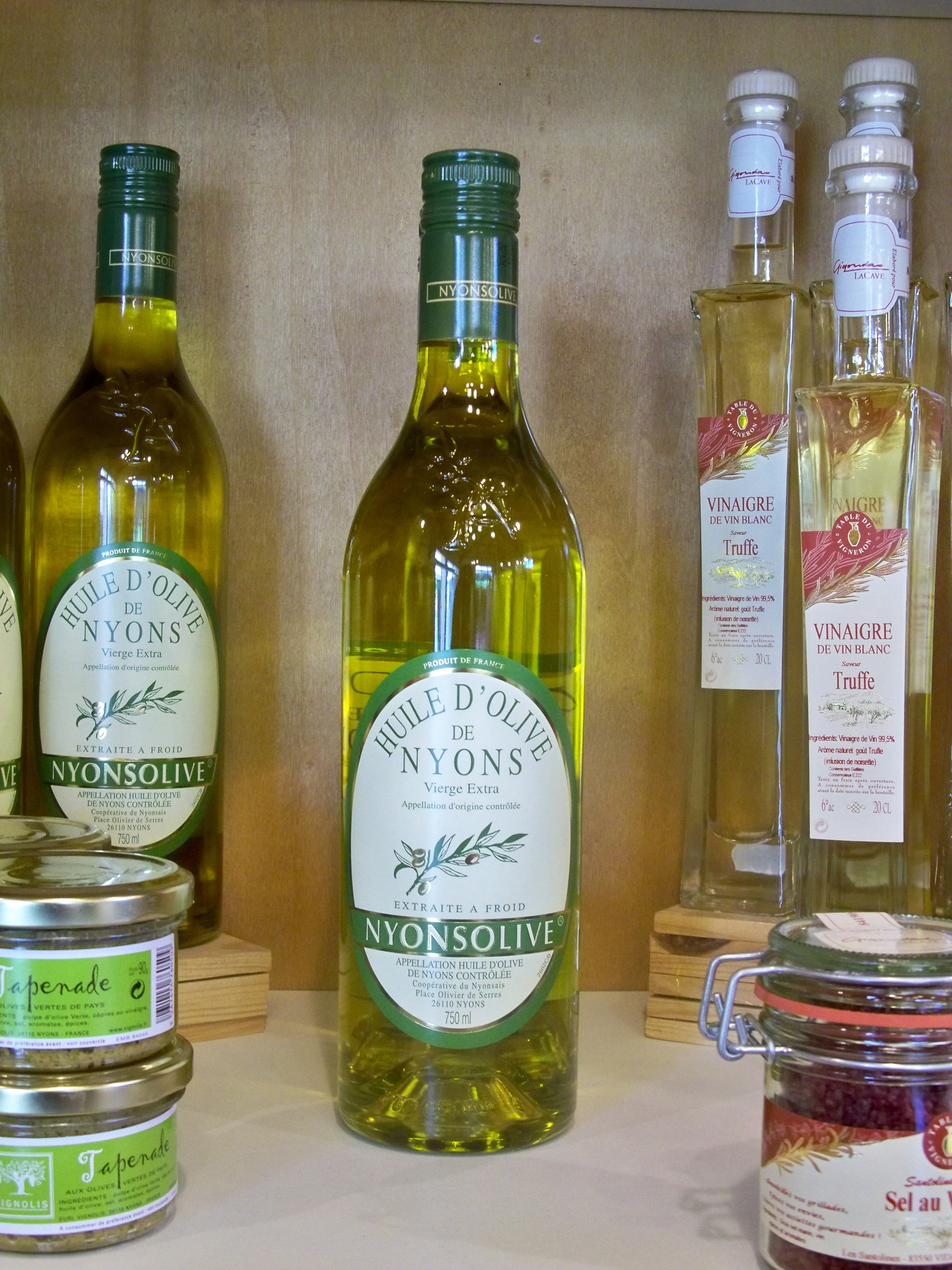 Bouteilles d'huile d'olive de Nyons